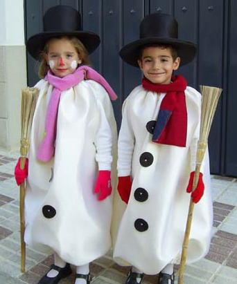 Disfraz3